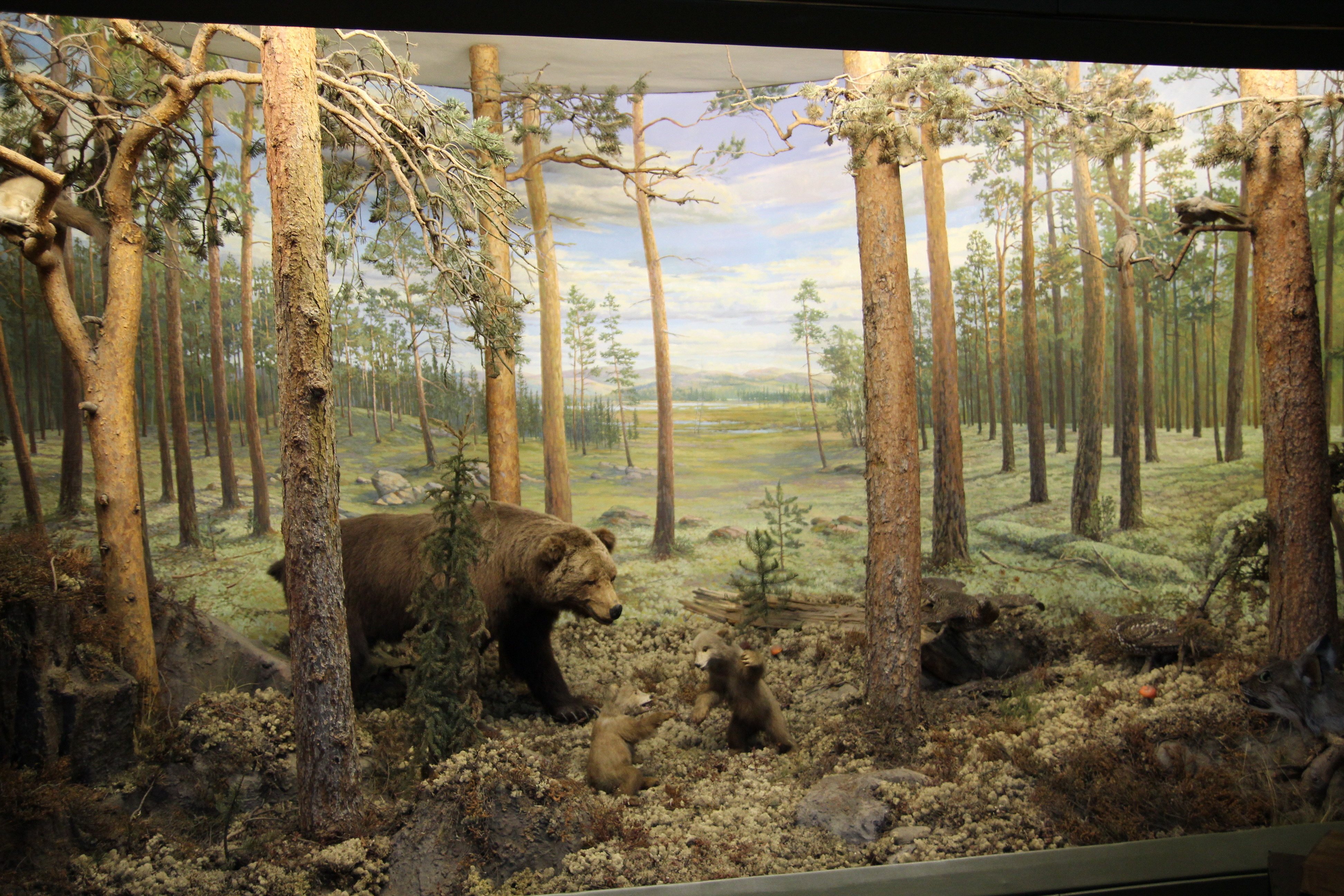 Экспозиция Лес в Мурманском краеведческом музее